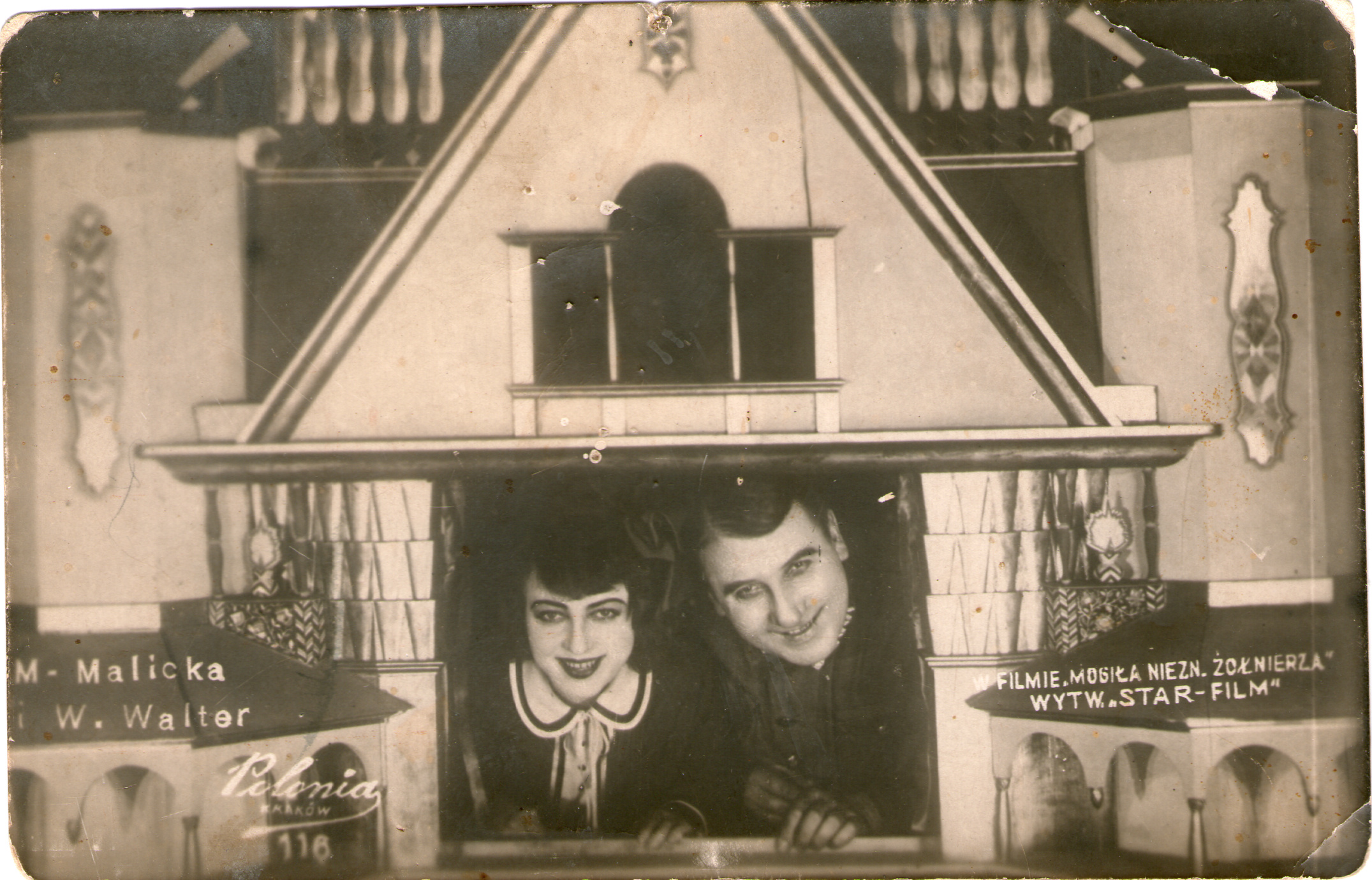 Беларуская (тарашкевіца): Польcкі фільм "Магіла невядомага салдата" (1927), паштоўка